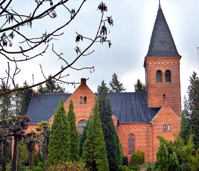 Glamsbjerg (Fyn) fra nord